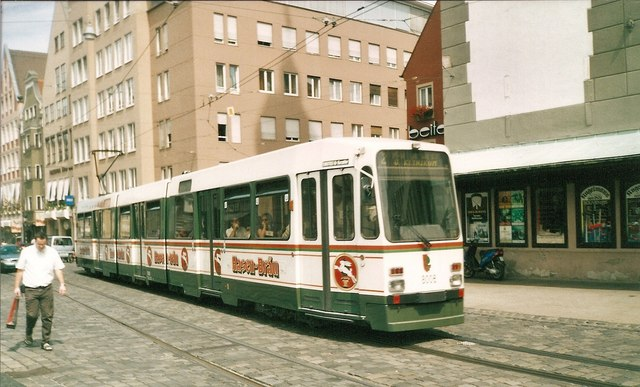 Strassenbahnwagen beim Perlachturm